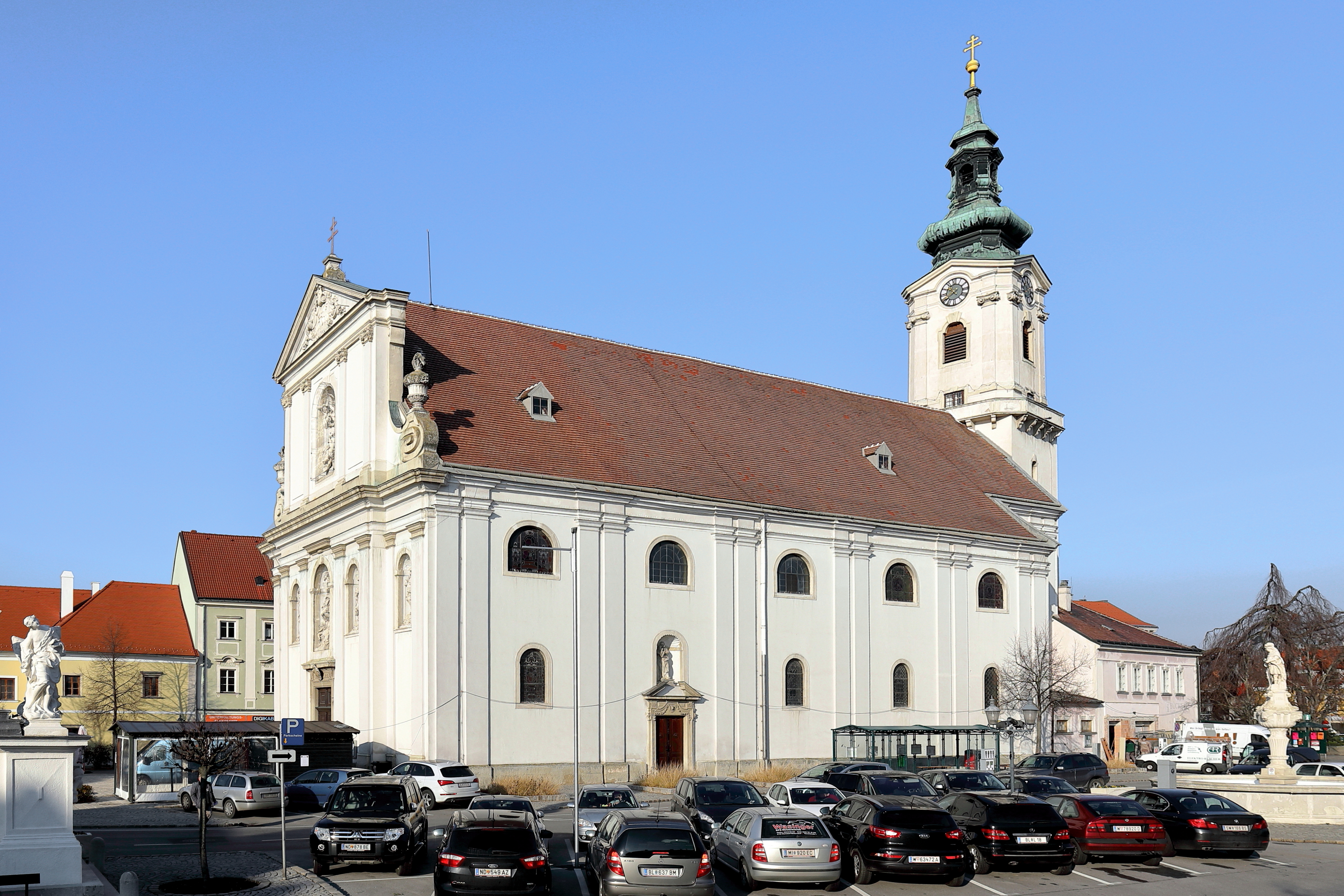 Südostansicht der röm.-kath. Pfarrkirche hl. Dreifaltigkeit in der niederösterreichischen Stadtgemeinde Bruck an der Leitha. Links der Sockel mit einer Statue der 1707 errichteten Mariensäule und rechts der 1713 erbaute Florianibrunnen.Die Kirche wurde von 1696 bis 1702 unter Einbeziehung des Stadtturmes errichtet. Dieser ist bis zum Schallgeschoss mittelalterlich (um 1230). Der Umlaufgang wurde im 16. Jahrhundert errichtet und das barocke Glockengeschoss um 1740. Die schmucklose Stirnfront wurde ebenfalls in dieser Zeit (1738–40) umgebaut. Unter anderem wurde sie mit einem geschosstrennenden Gebälk, einem giebelbekrönten Obergeschoss und einem dreiachsigen Mittelrisalit gegliedert. Zusätzlich wurden 6 Rundbogennischen für Steinstatuen eingebaut.